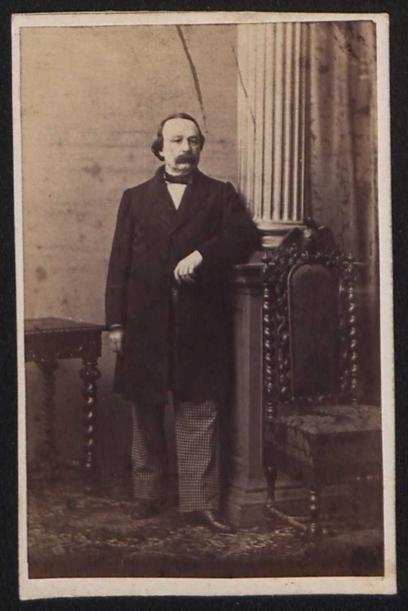 Fotografia, odbitka na papierze albuminowym; 9,6x6,2 cm